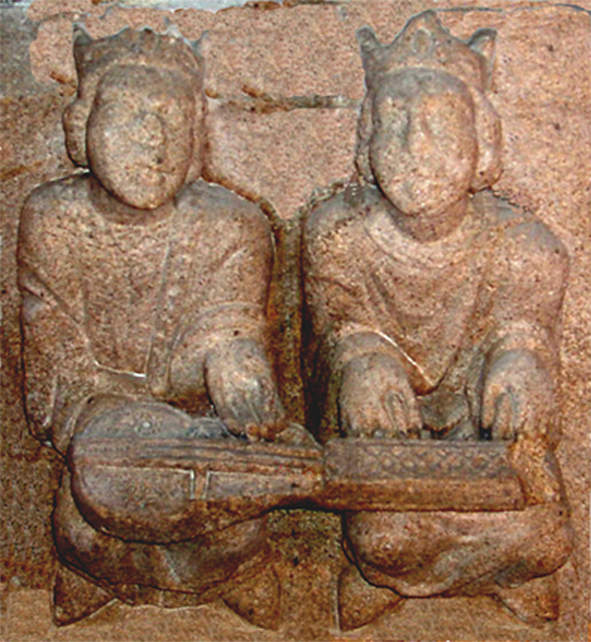 Organistrum del Palacio Gelmirez, Galicia (España).